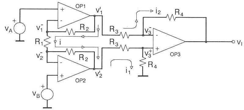 Instrumentacioni pojačavač